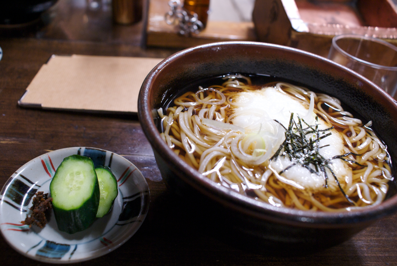 囲炉裏のとろろそば